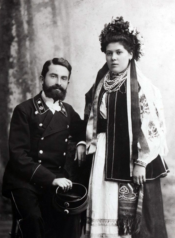 Батьки українсько-французького танцівника Сержа Лифаря